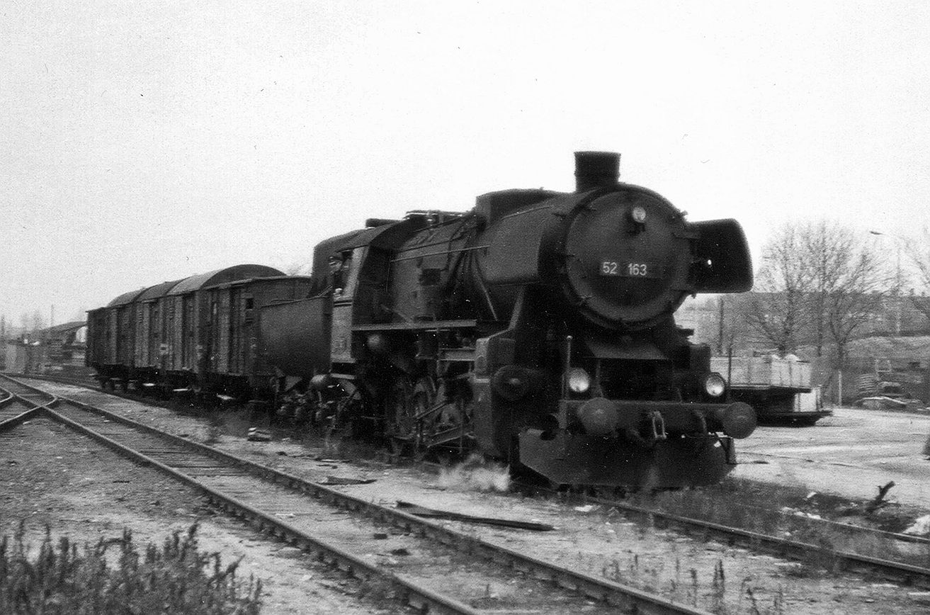 Die Lok des Bw Wustermark wurde für die Filmaufnahmen zur TV-Serie "Holocaust" optisch bearbeitet, z.B. die Loknummer.